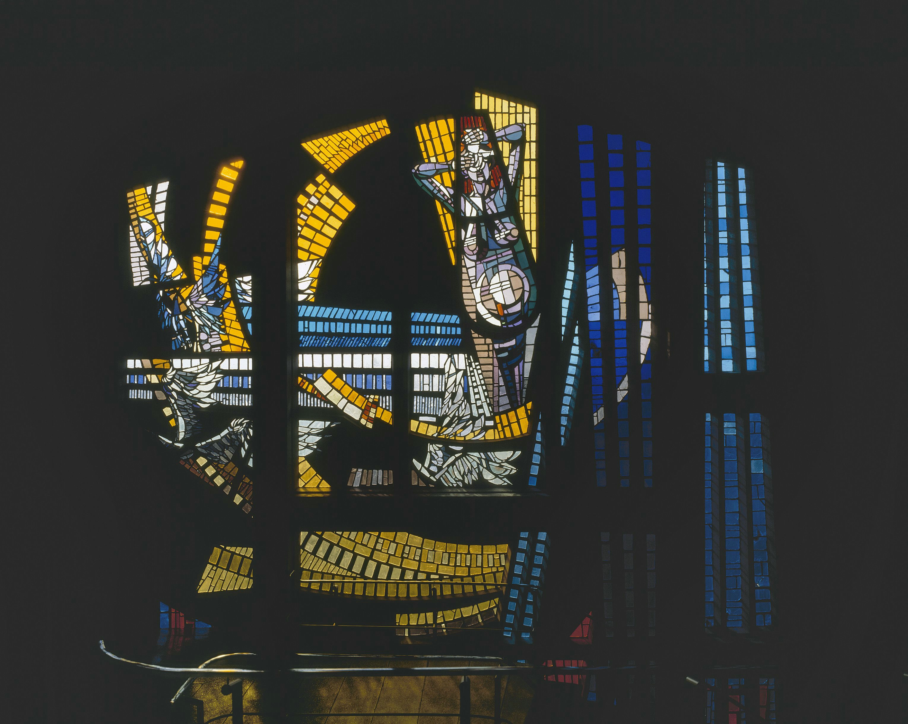 Raadhuis: Interieur, aanzicht glas-in-betonraam (opmerking: Gefotografeerd voor Glas in lood in Nederland 1817-1968)